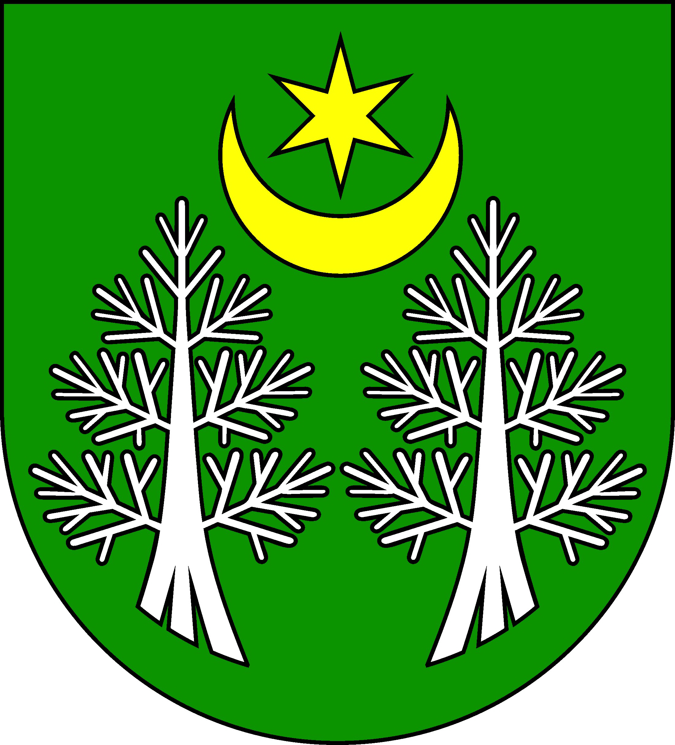 Herb gminy Adamów w powiecie zamojskim.